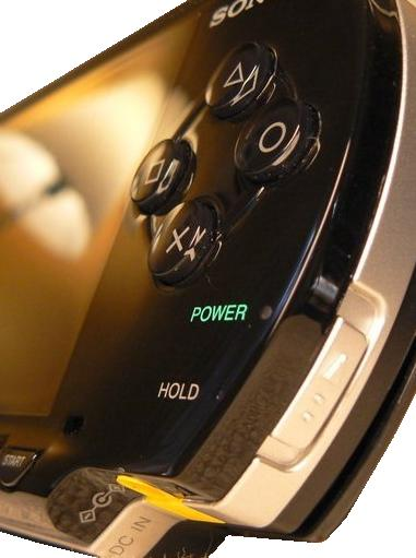 Playstation Portable fotograferad från sidan, både på/av-knappen och dc-inkontakten är väl synliga